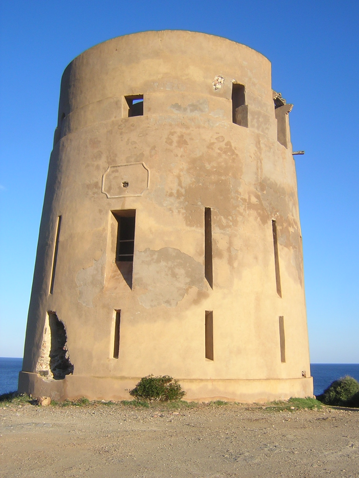 Torre costiera della Sardegna